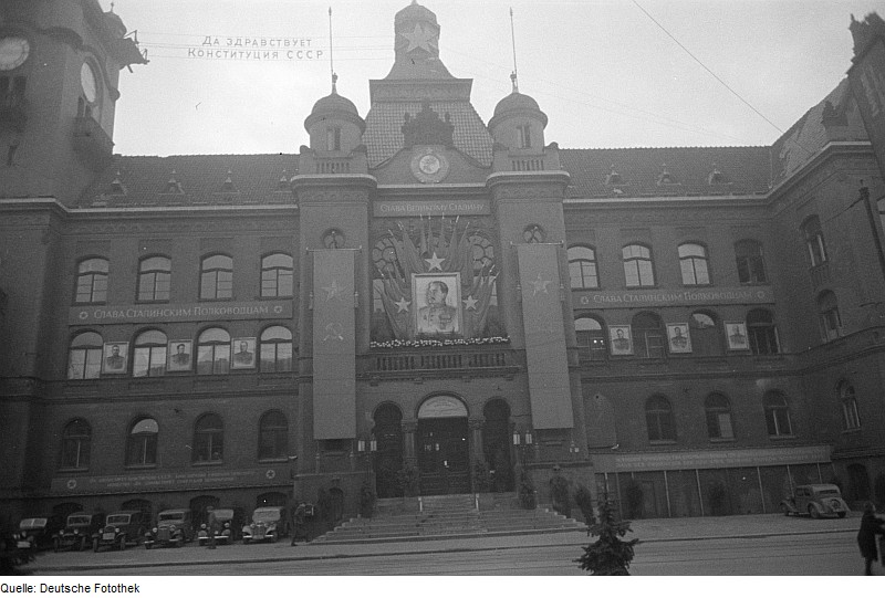 Original image description from the Deutsche Fotothek Gebäude der russischen Kommandantur in Berlin-Pankow (Rathaus Pankow, Breite Straße 24a-26, 13187 Berlin [Pankow])